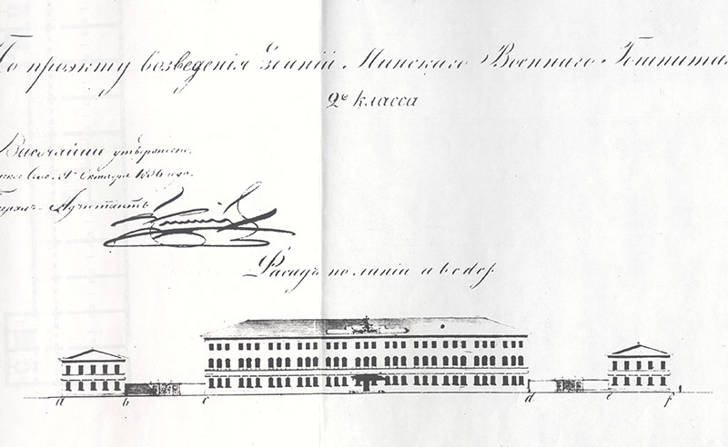 Беларуская (тарашкевіца): Менск (Miensk), вуліца Шпітальная (vulica Špitalnaja). Вайсковы шпіталь